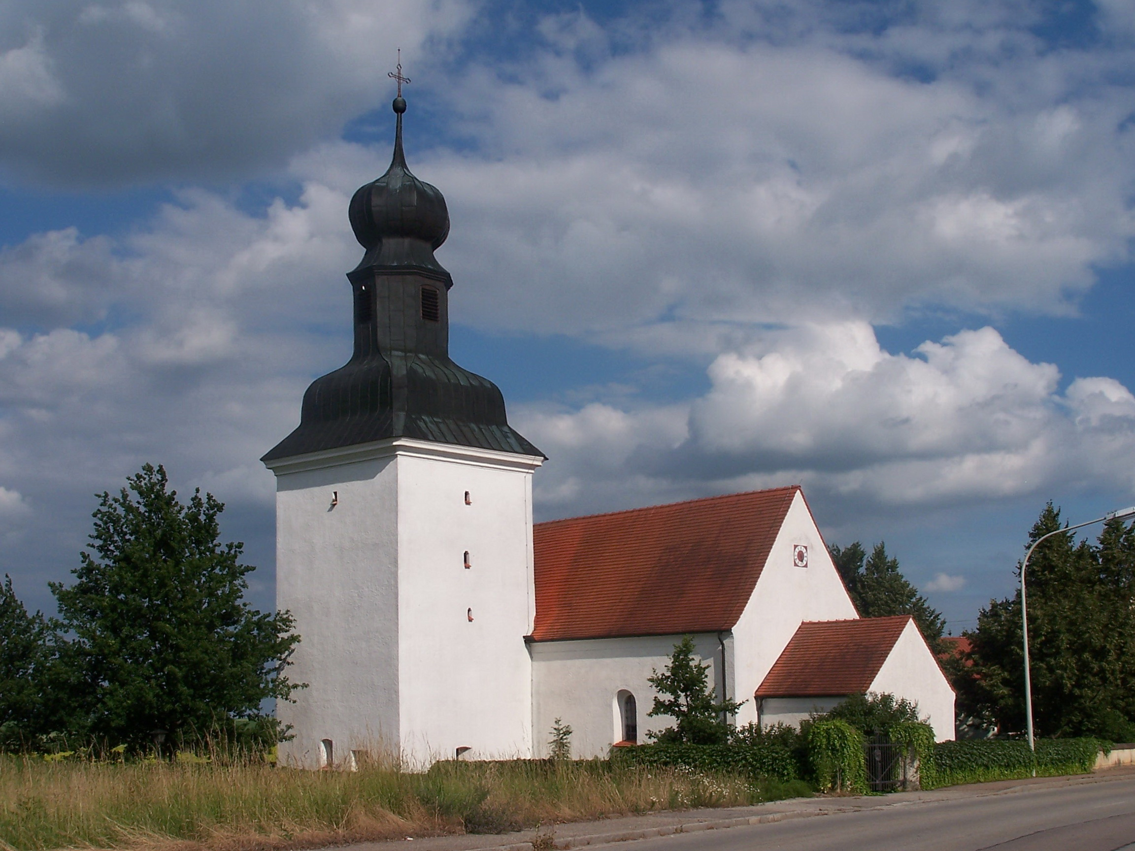 Riekofen, Oberehring 10. Katholische Filialkirche St. Stephan, Saalbau mit abgewalmtem Satteldach und Flankenturm mit Haubendach, im Kern 12./13. Jahrhundert, Umbauten 15. Jahrhundert, Langhaus 1650 erneuert.